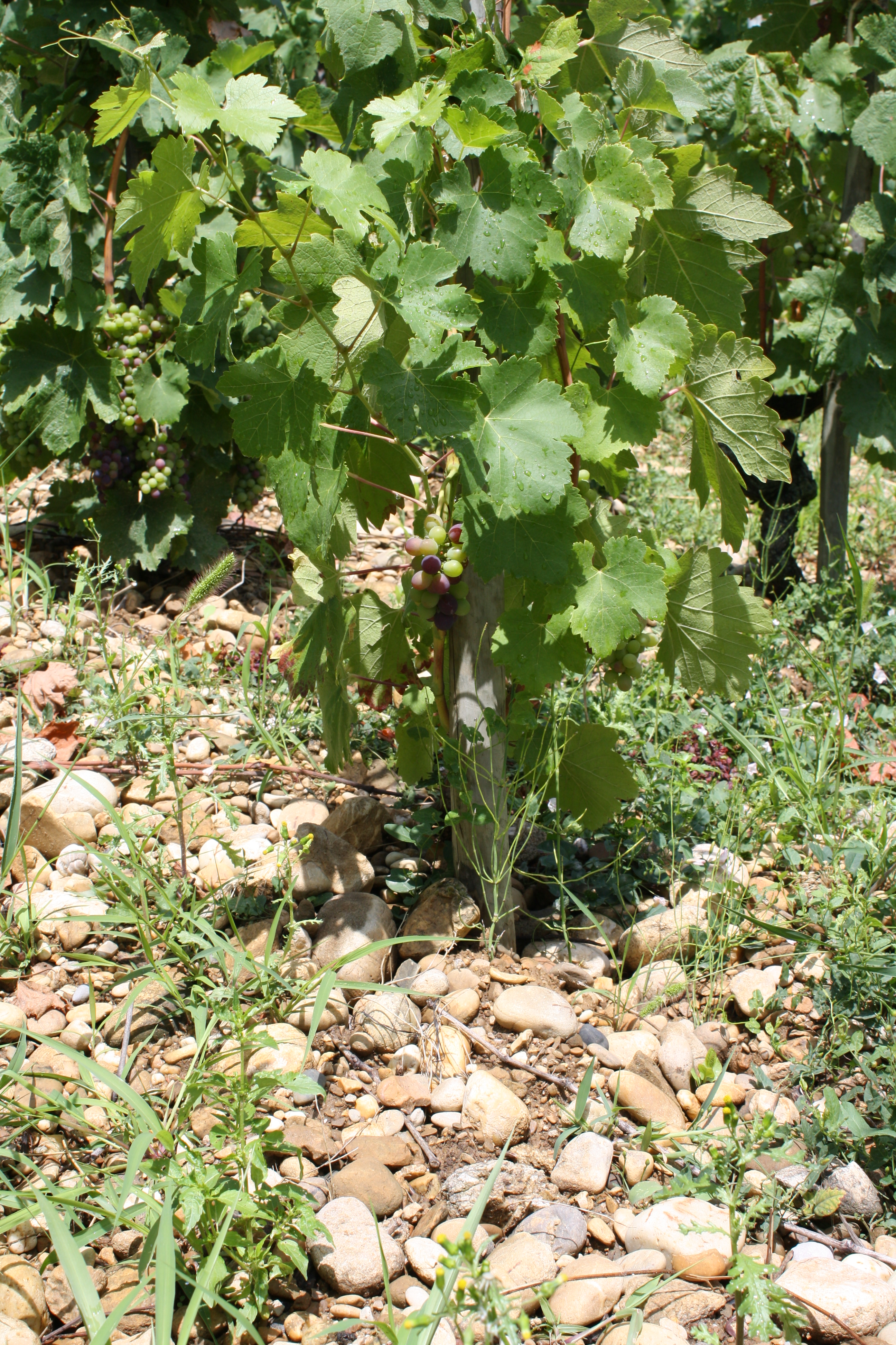 Pied de syrah en véraison sur des galets à Tain l'Hermitage